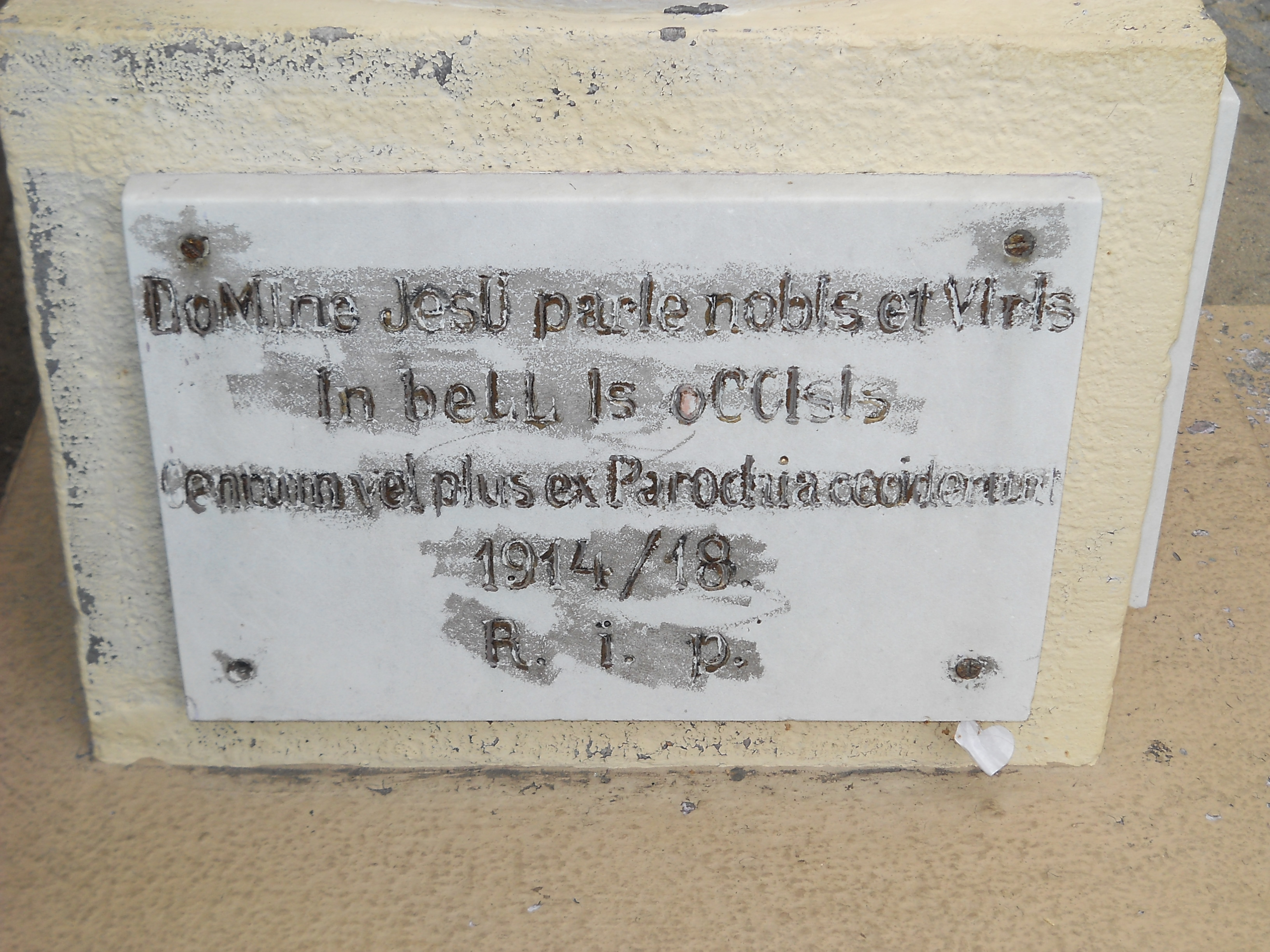 Pyskowice, ul. Poniatowskiego 10 - kościół parafialny pw. św. Mikołaja, kolumna maryjna, tablica (zabytek nr A/289/60 z 7.03.1960)